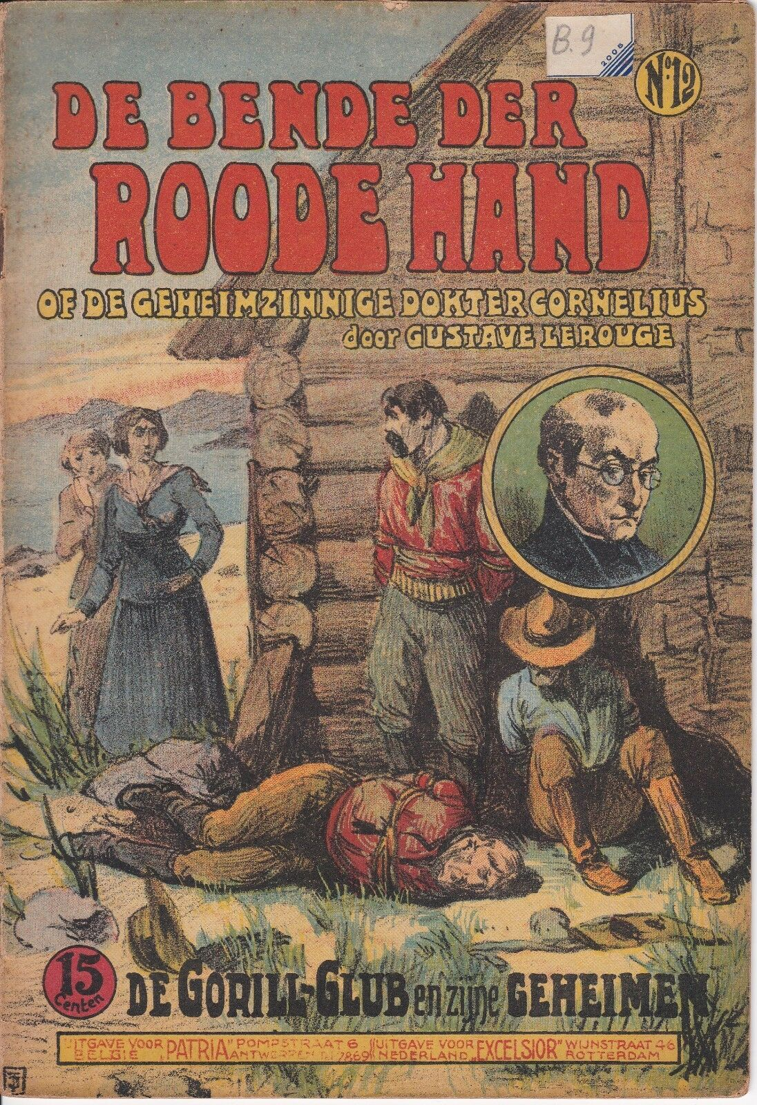 Gustave Le Rouge, Le mystérieux docteur Cornélius, Anvers, Éditions Patria, fascicule n° 12, 1927. Couverture illustrée par Julien T'Felt.